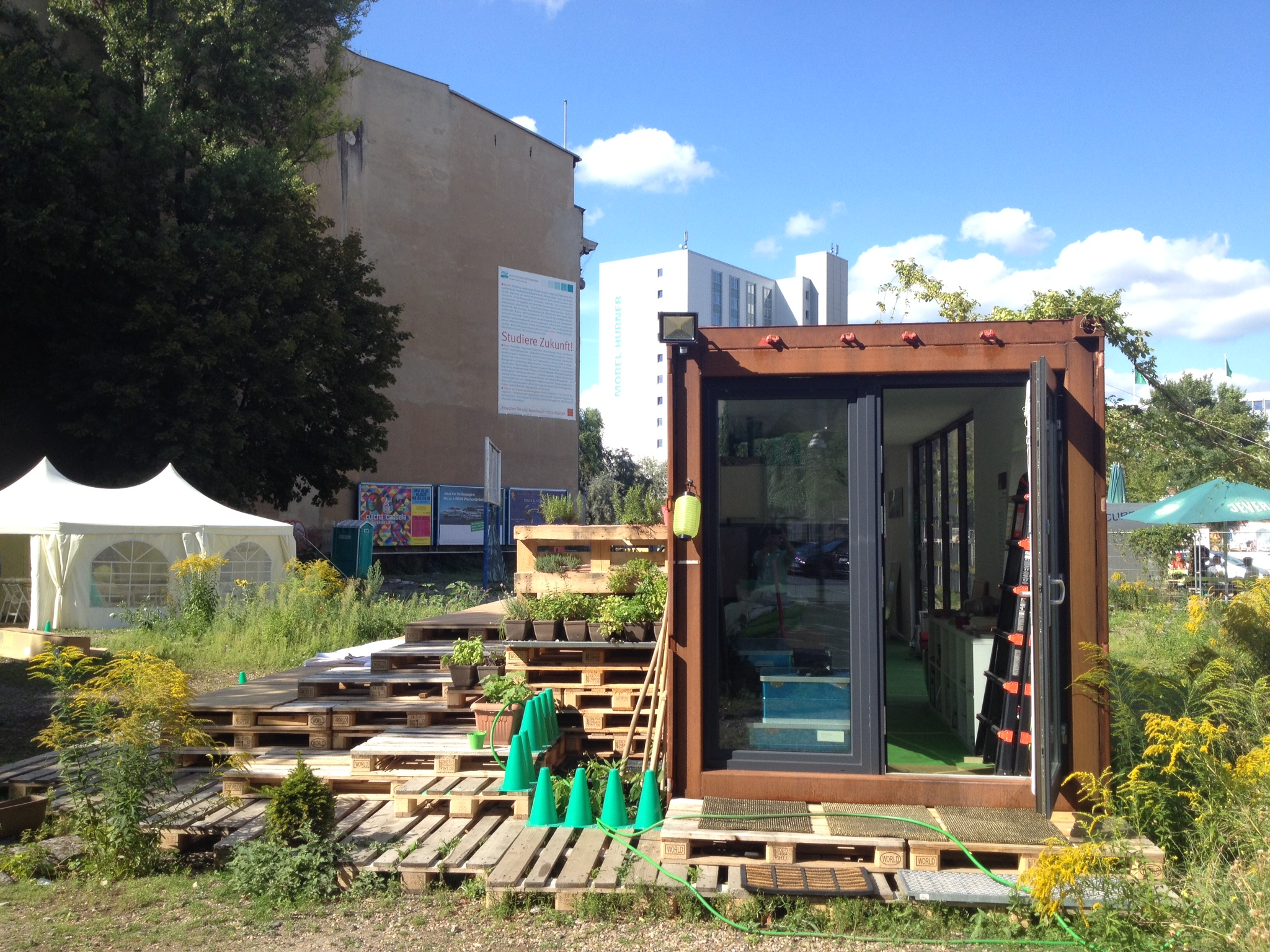 Notkers Container, Frobenstraße 1 mit Zelt und Möbelhochhaus